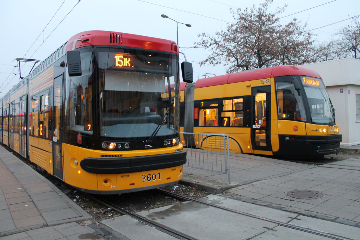 Tramwaj Pesa Jazz Duo 128N #3601 stoi na pętli P+R Aleja Krakowska.